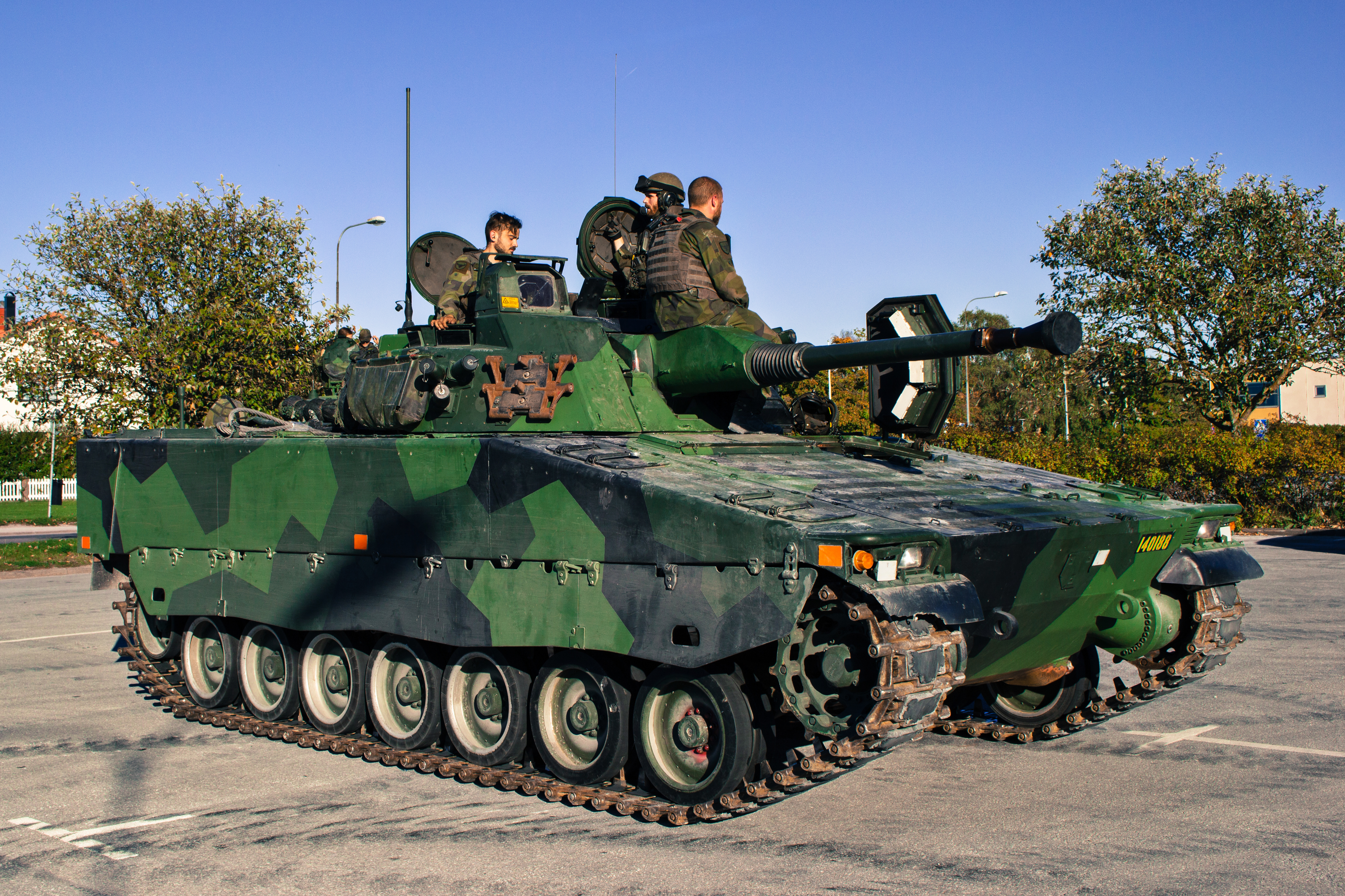 Stridsfordon 90 do exército sueco en Visby.